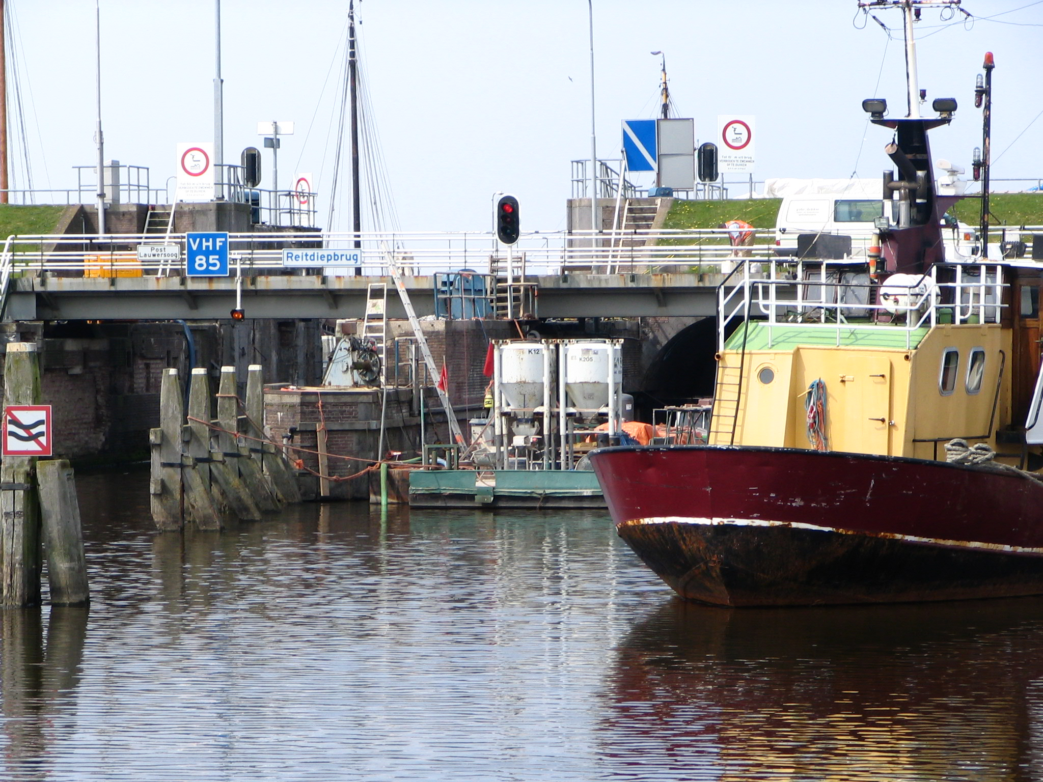 Eigen foto. GerardM 27 apr 2004 09:08 (CEST) De Reitdiepbrug gezien vanuit Zoutkamp.